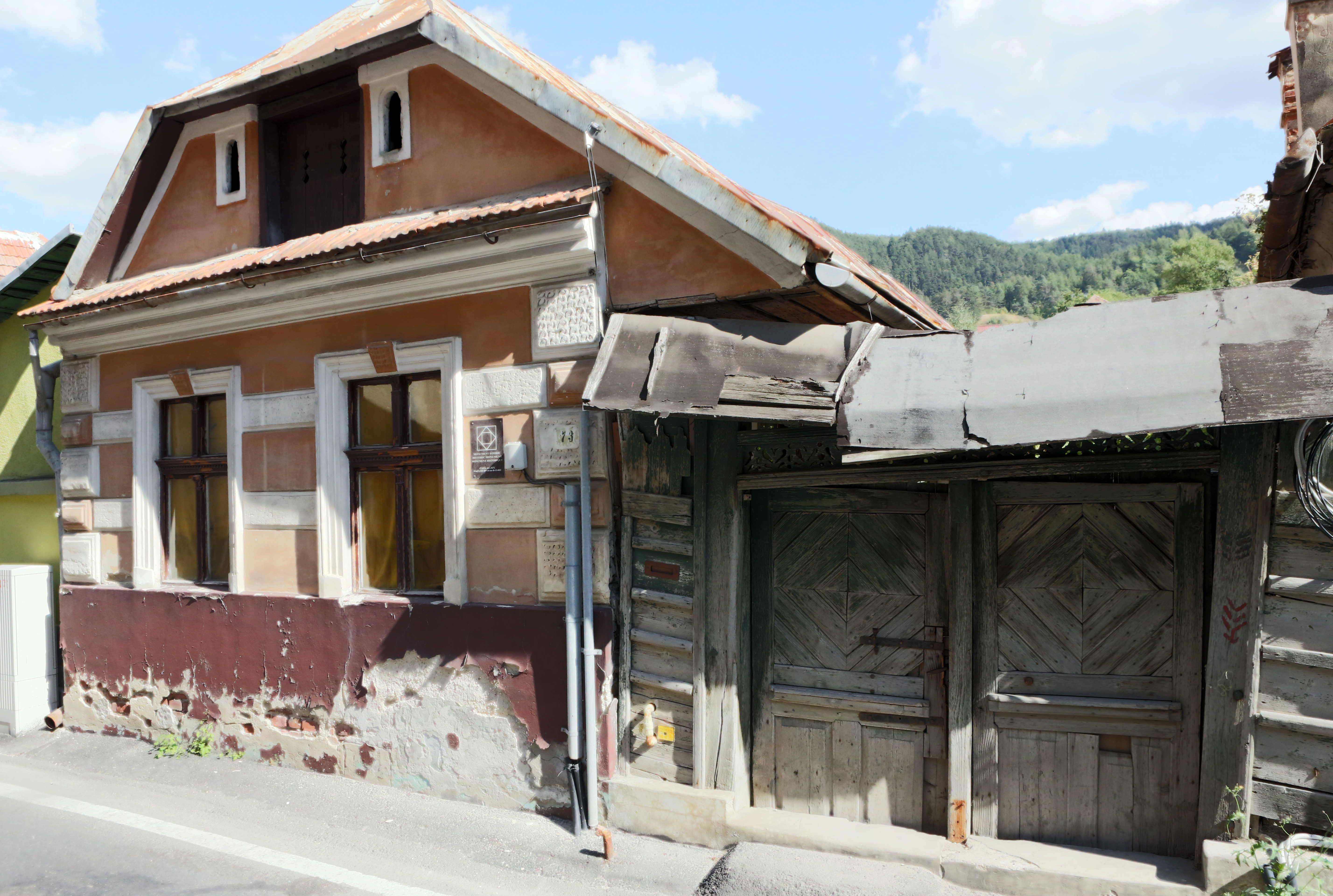 Casă și poartă de lemn